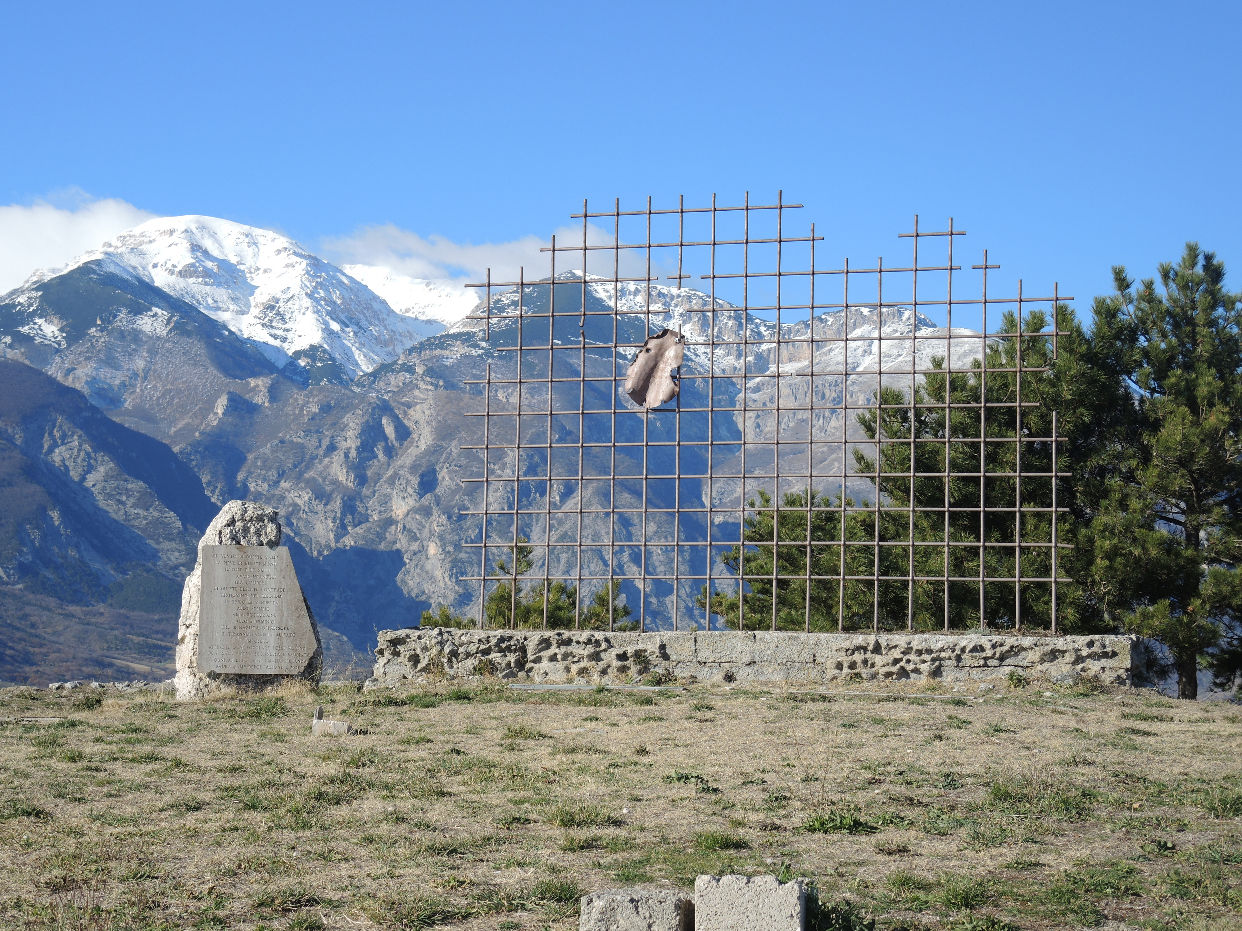 Gessopalena